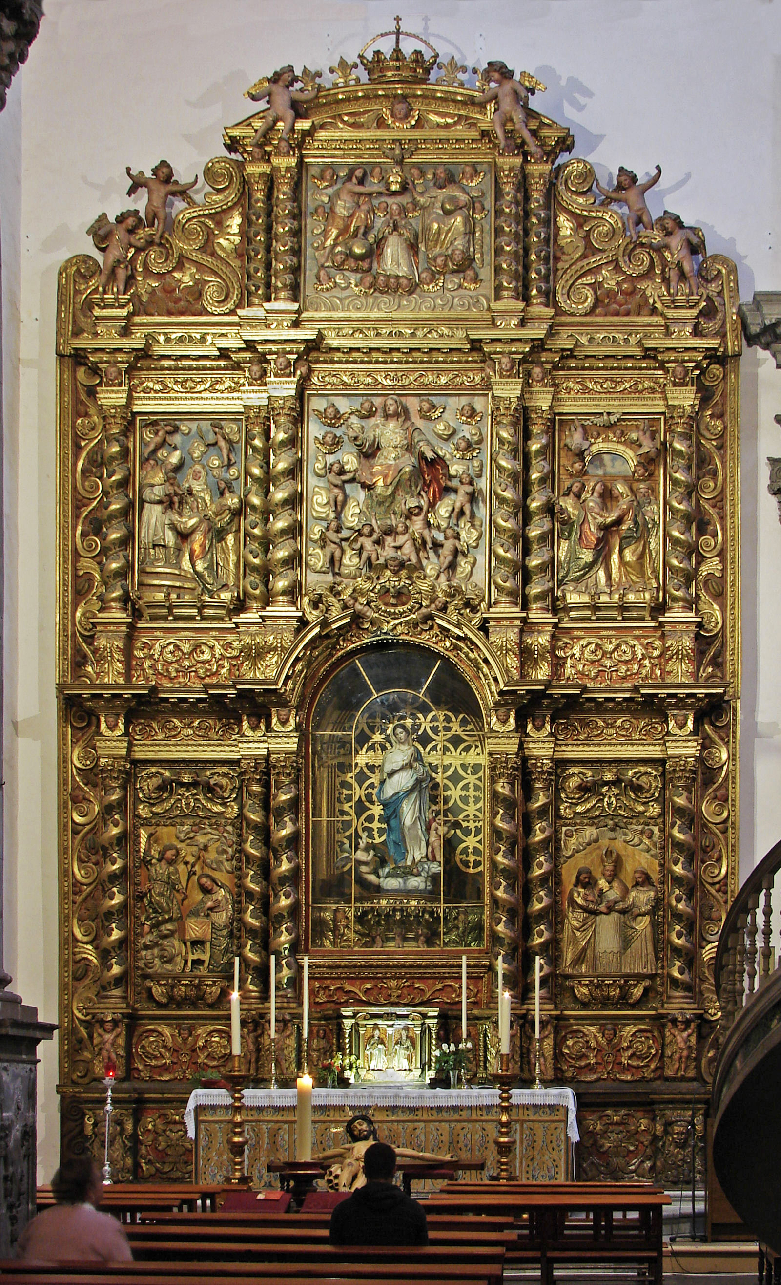 Altar im südlichen Seitenschiff der Kirche Concepción in La Orotava Teneriffa